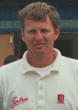 Peter Such